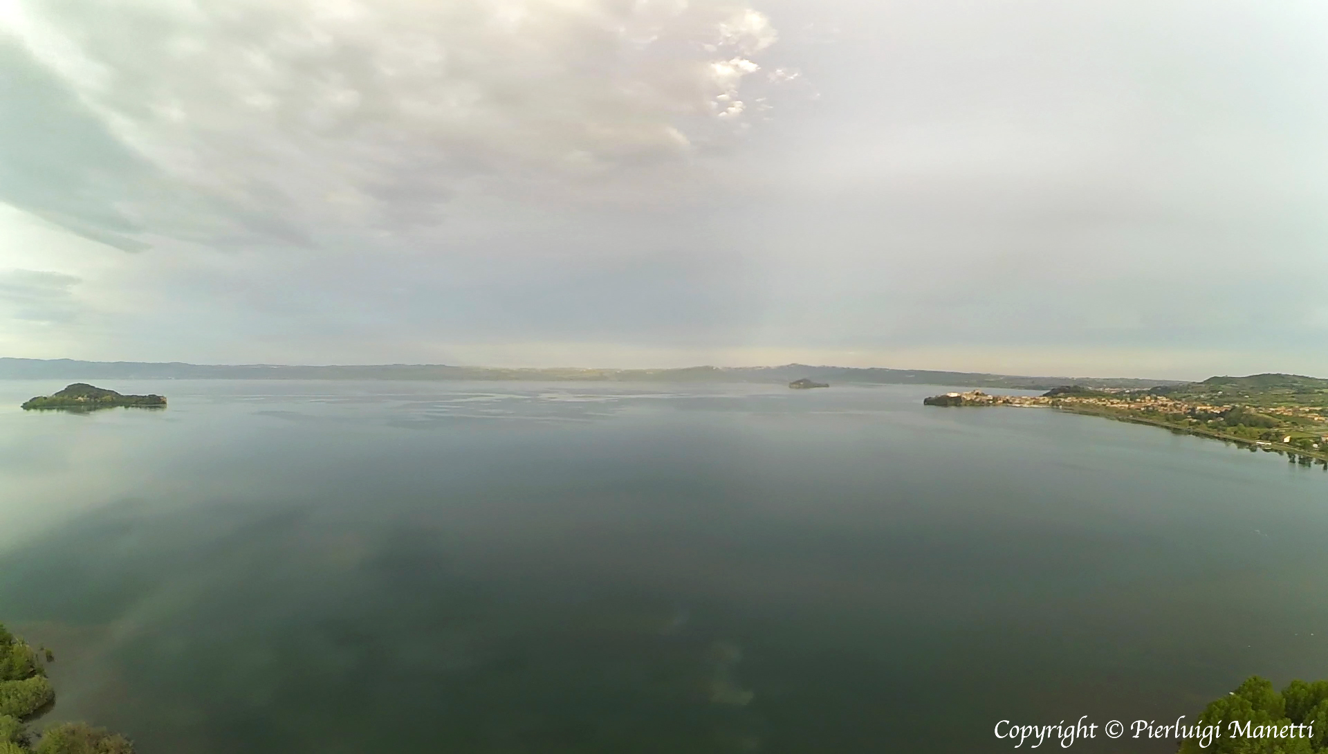 Capodimonte ( VT ) - Isola Bisentina a sinistra, isola Martana sullo sfondo, il paese di Capodimonte a destra e non può mancare lo specchio naturale del Lago di Bolsena